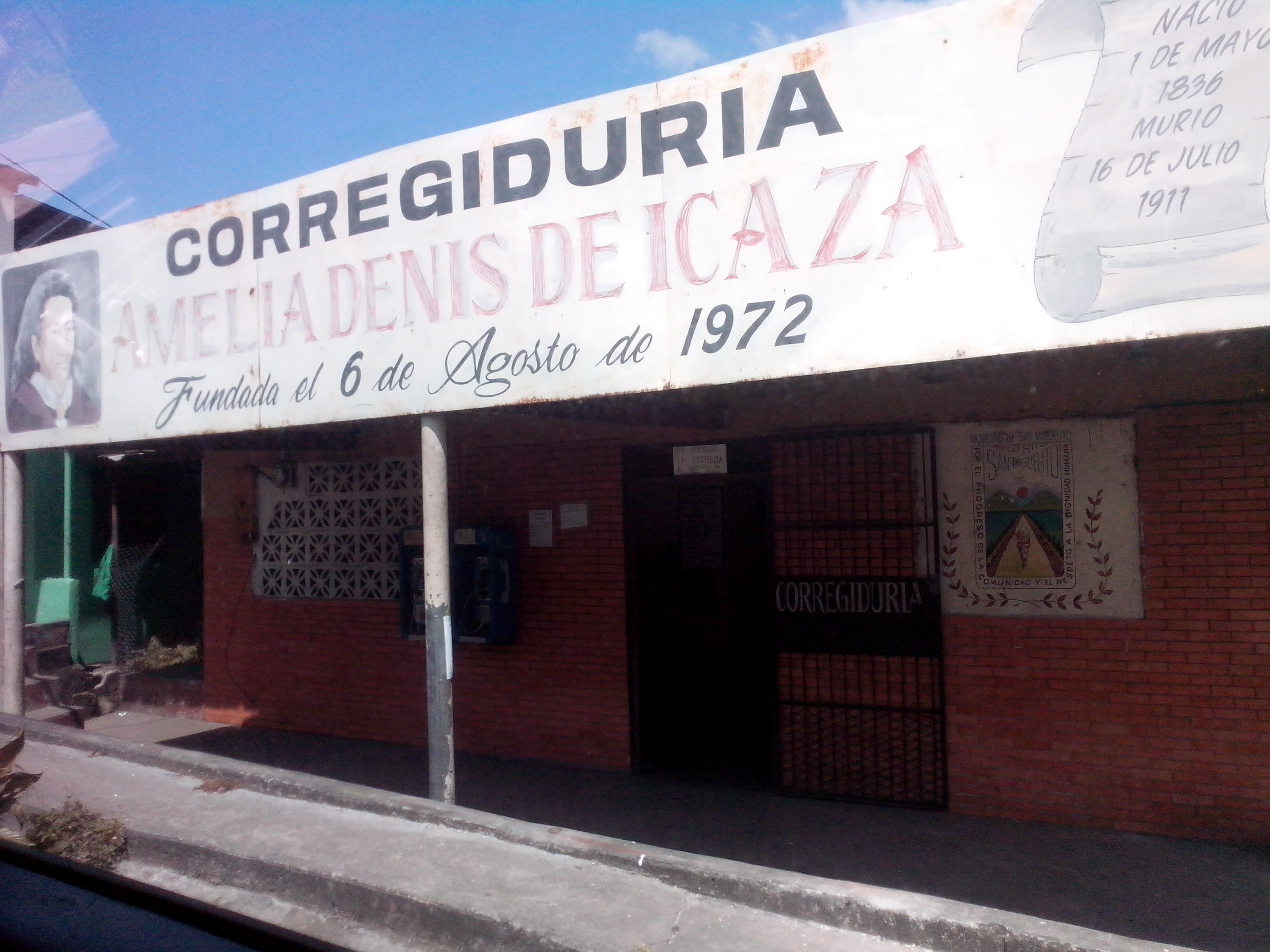 San Miguelito, Panama